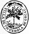 Escut antic de Figuerola d'Orcau (Isona i Conca Dellà, Pallars Jussà)